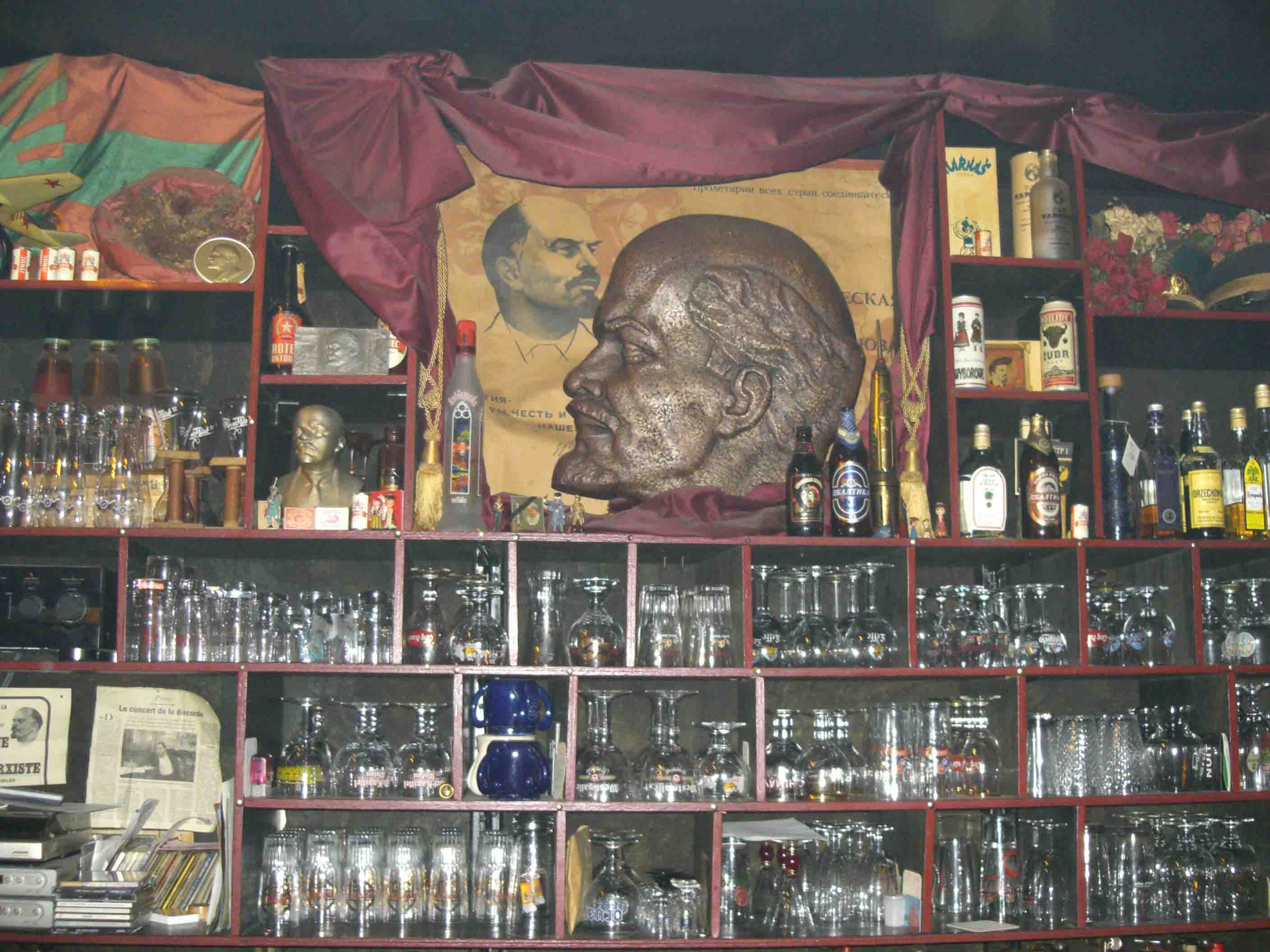 Intérieur du bar Le Kremlin à Lille (Nord, France).